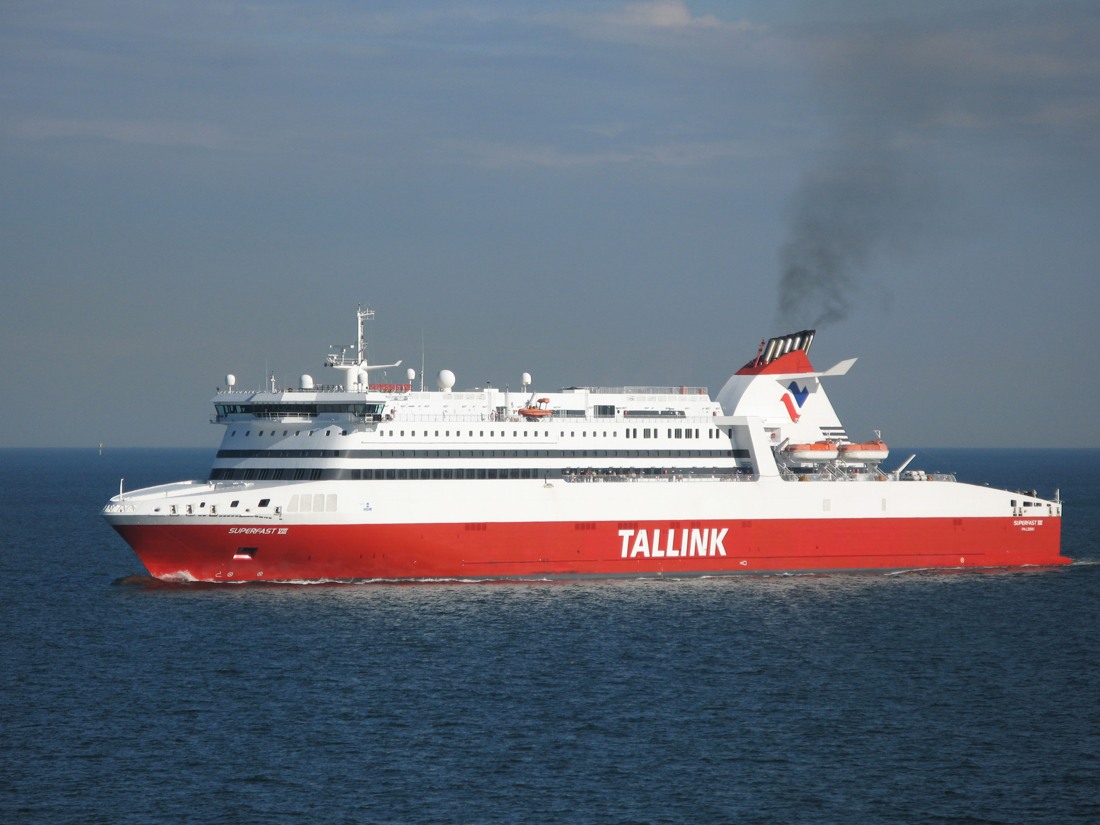 M/S Superfast VIII near Helsinki